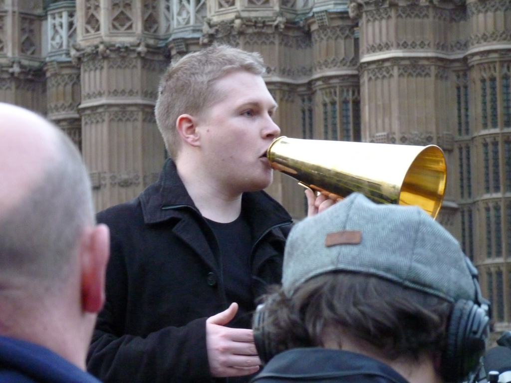 Dan Bull